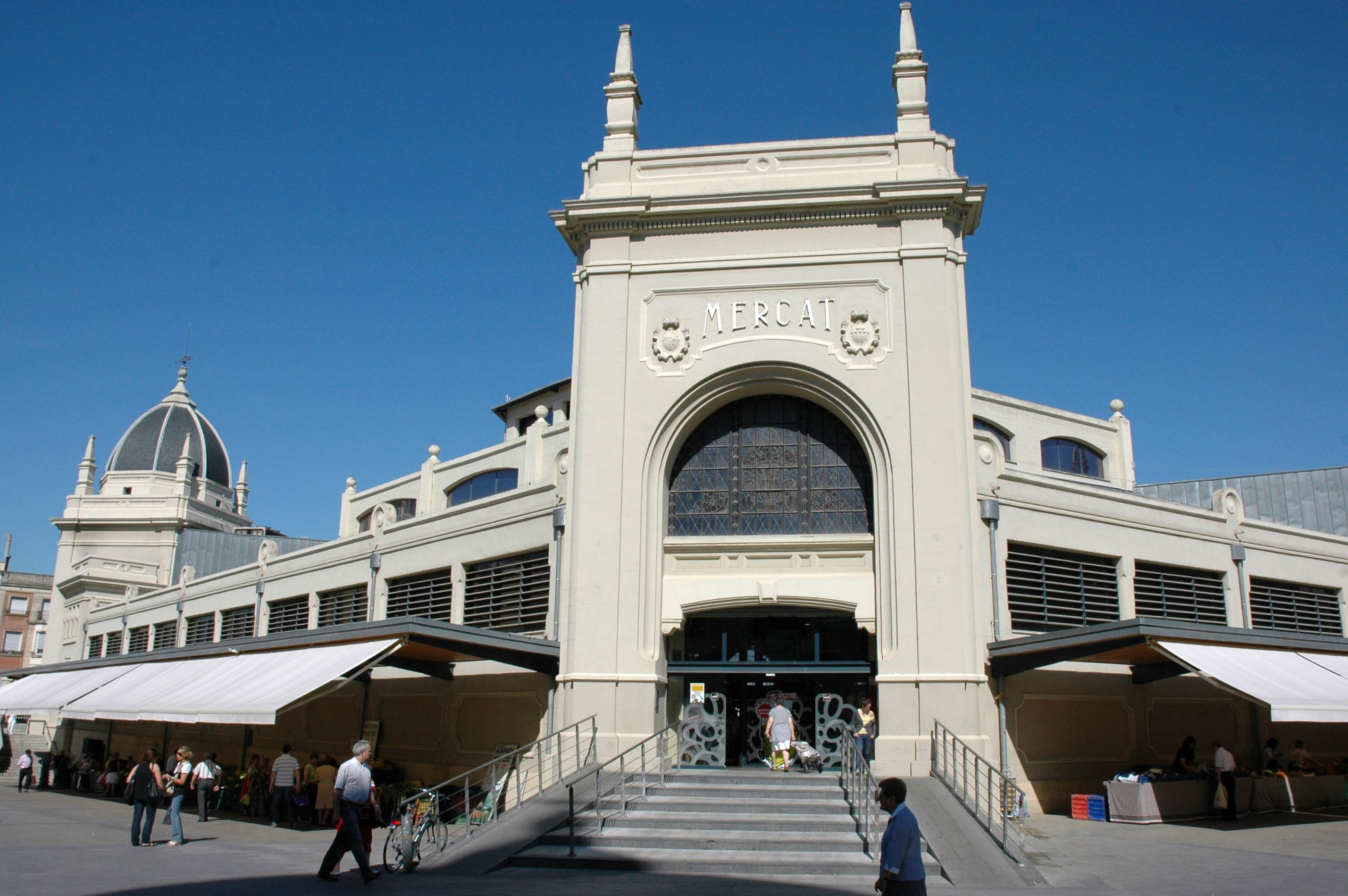 Mercat Central de Sabadell, obra de l'arquitecte Josep Renom